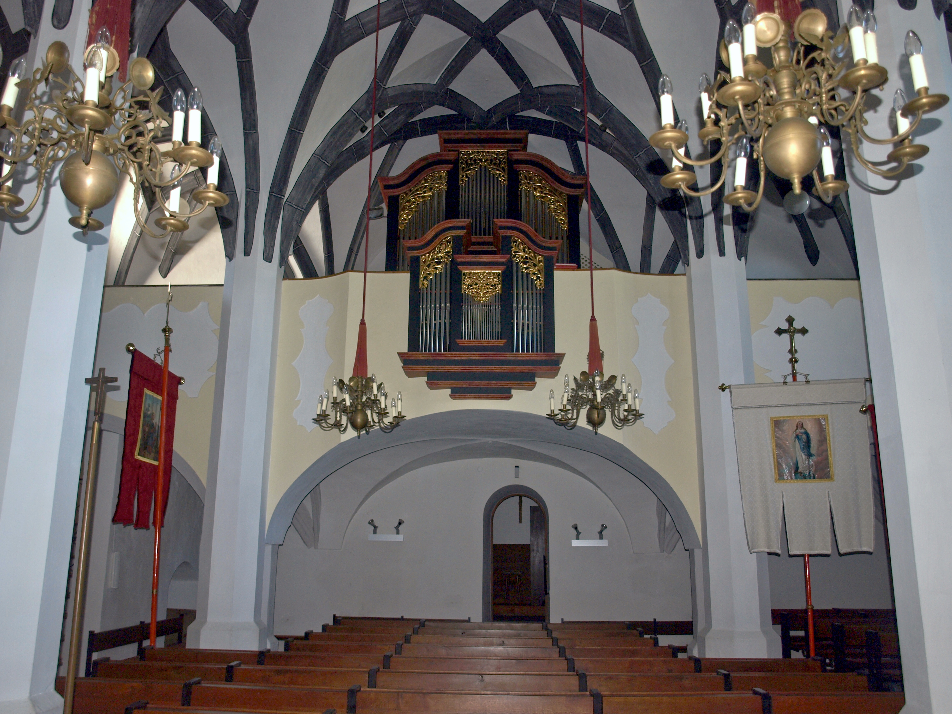 Kath. Pfarrkirche hl. Michael und Friedhof, St. Michael am Bruckbach, Gemeinde St. Peter in der Au